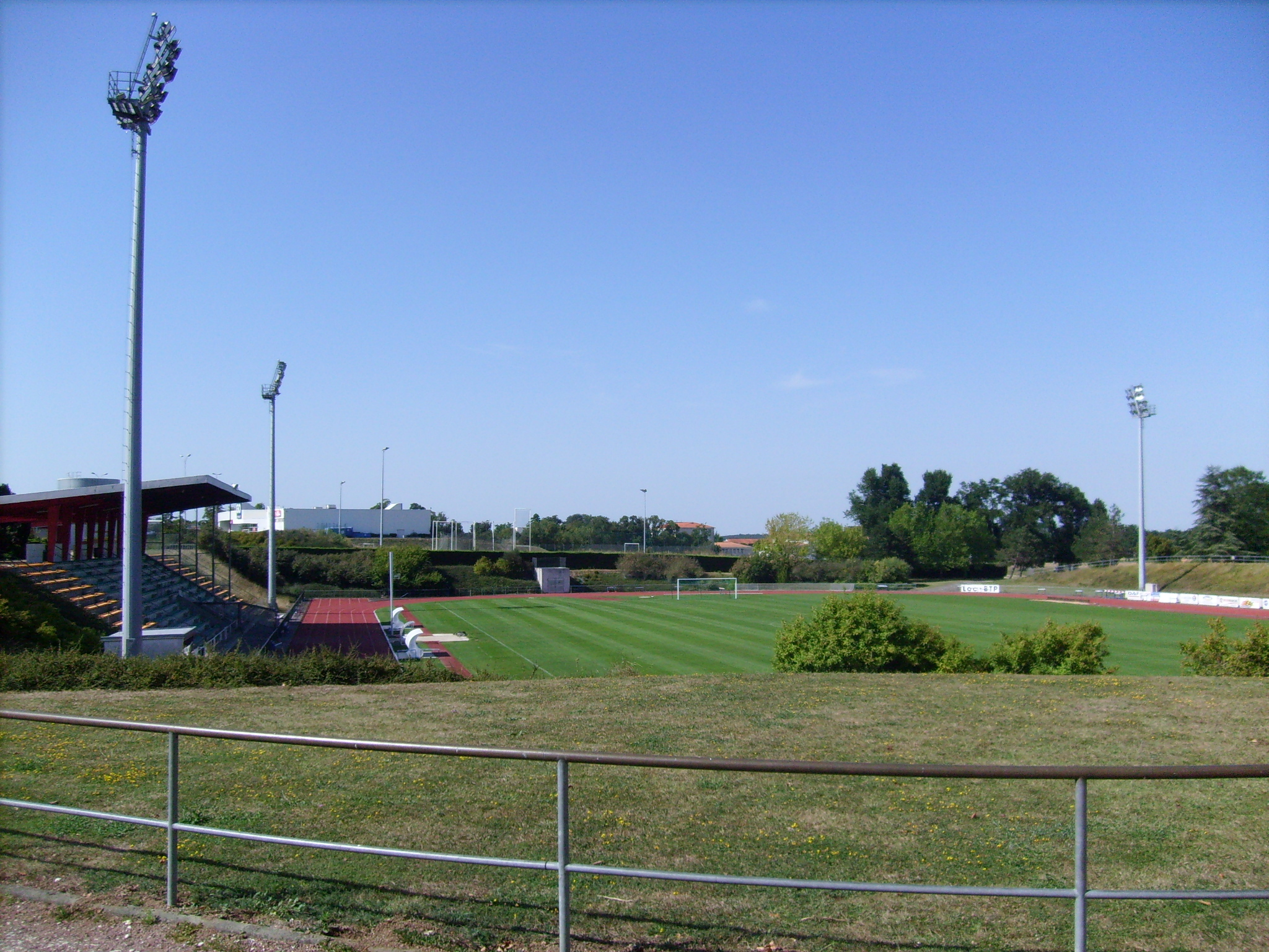 Le stade Yvon Chevalier à Saintes